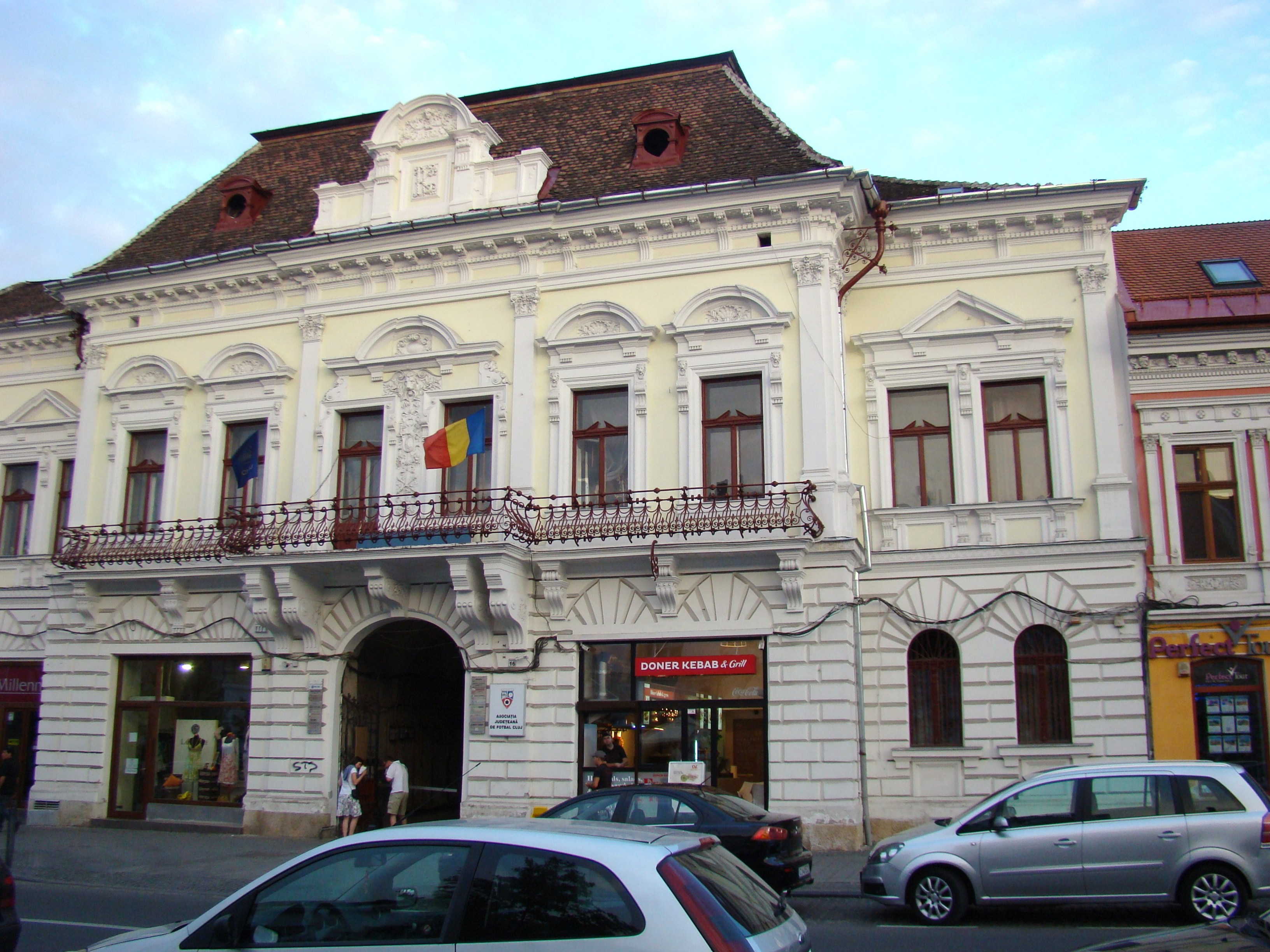 Clădire monument istoric, Bulevardul Eroilor, nr.16 (Casa Tricesimei)